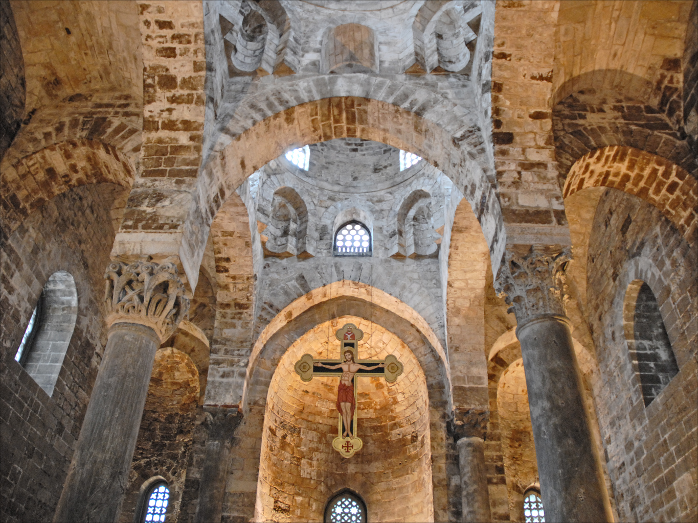 San Cataldo a été fondée à l'époque normande (12ème siècle) et a été le siège de l'ordre des Chevaliers du Saint Sépulcre. Elle est dans un style arabe caractérisé par sa forme carrée, ses merlons dentelés, ses arcatures et ses coupoles rosées. L'intérieur est structuré en 3 nefs séparées par des colonnes antiques de réemploi. Le pavement en mosaïque de marbre polychrome date de la construction. Article de Wikipedia